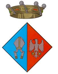 Escut oficial del Municipi de la Bisbal del Penedès, Tarragona.